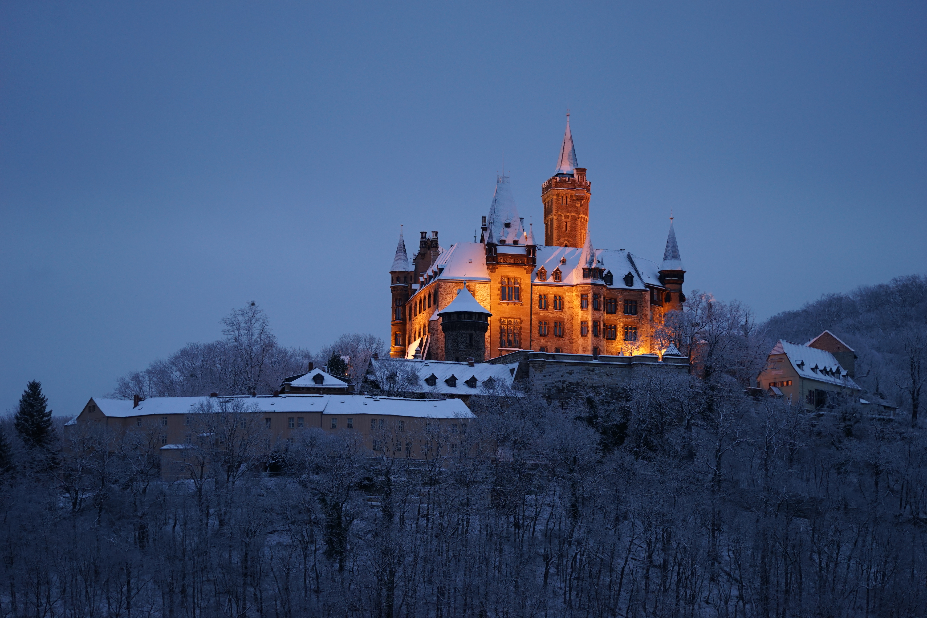 Schloß Wernigerode im Winter